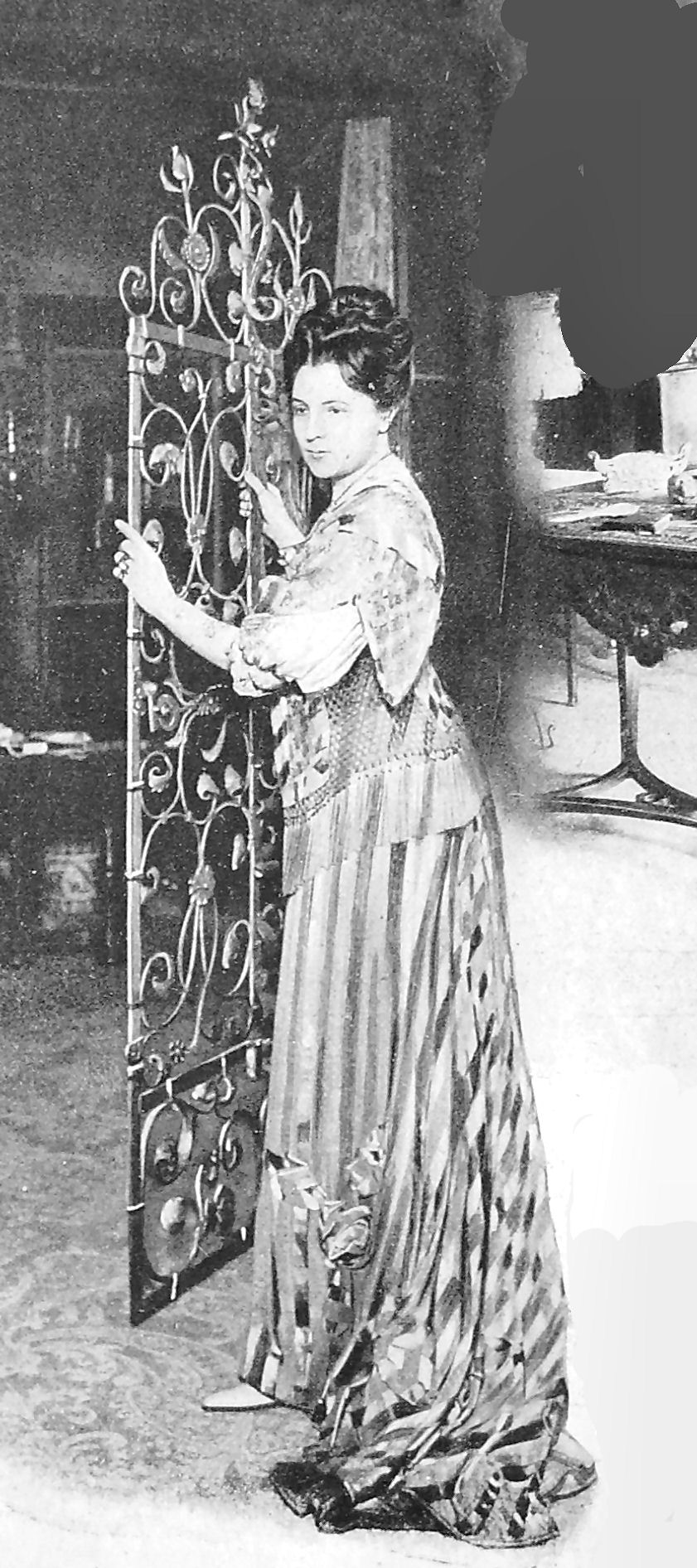 Photo en pieds de Jeanne de Flandreysy